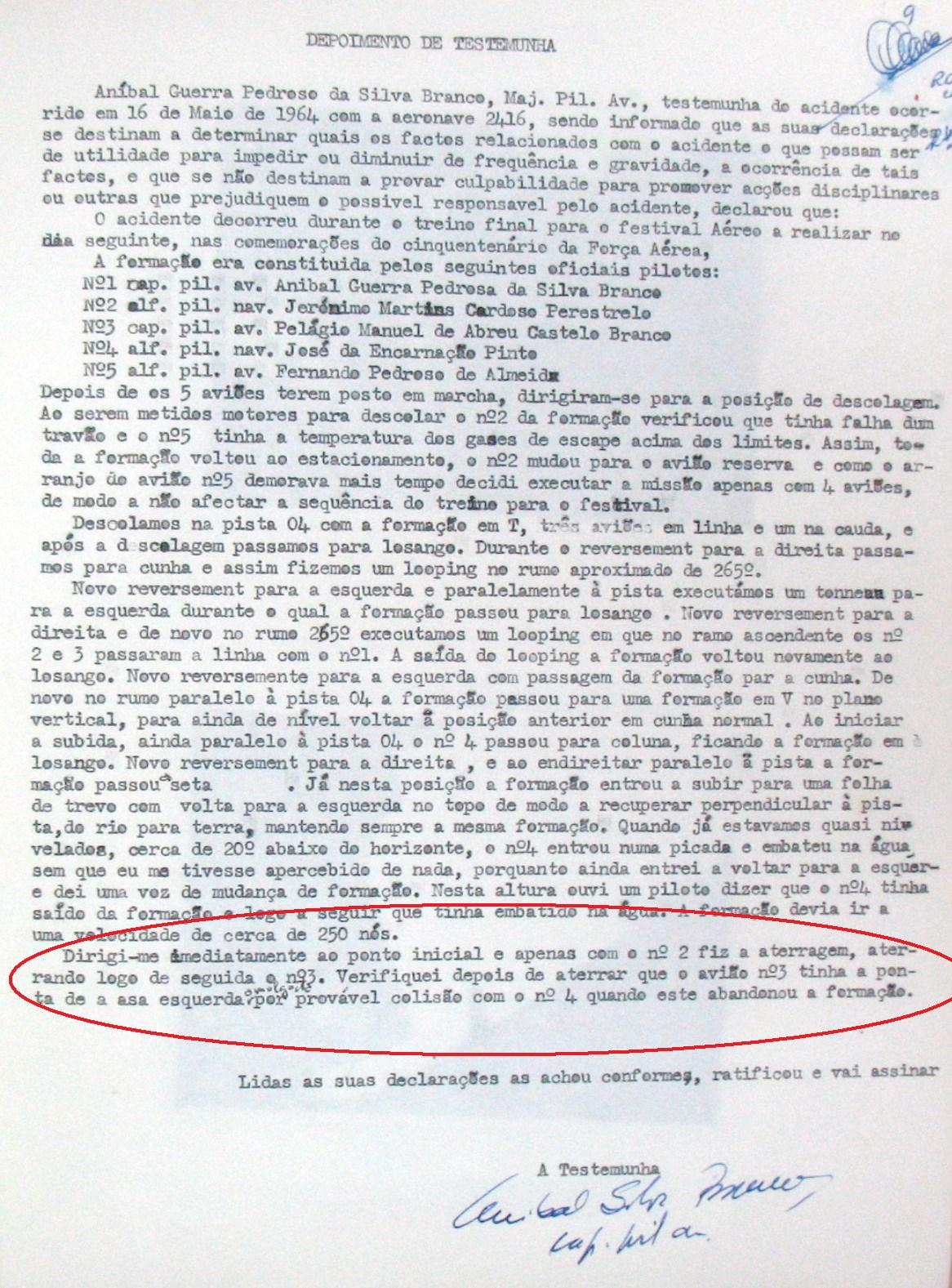 Testemunho